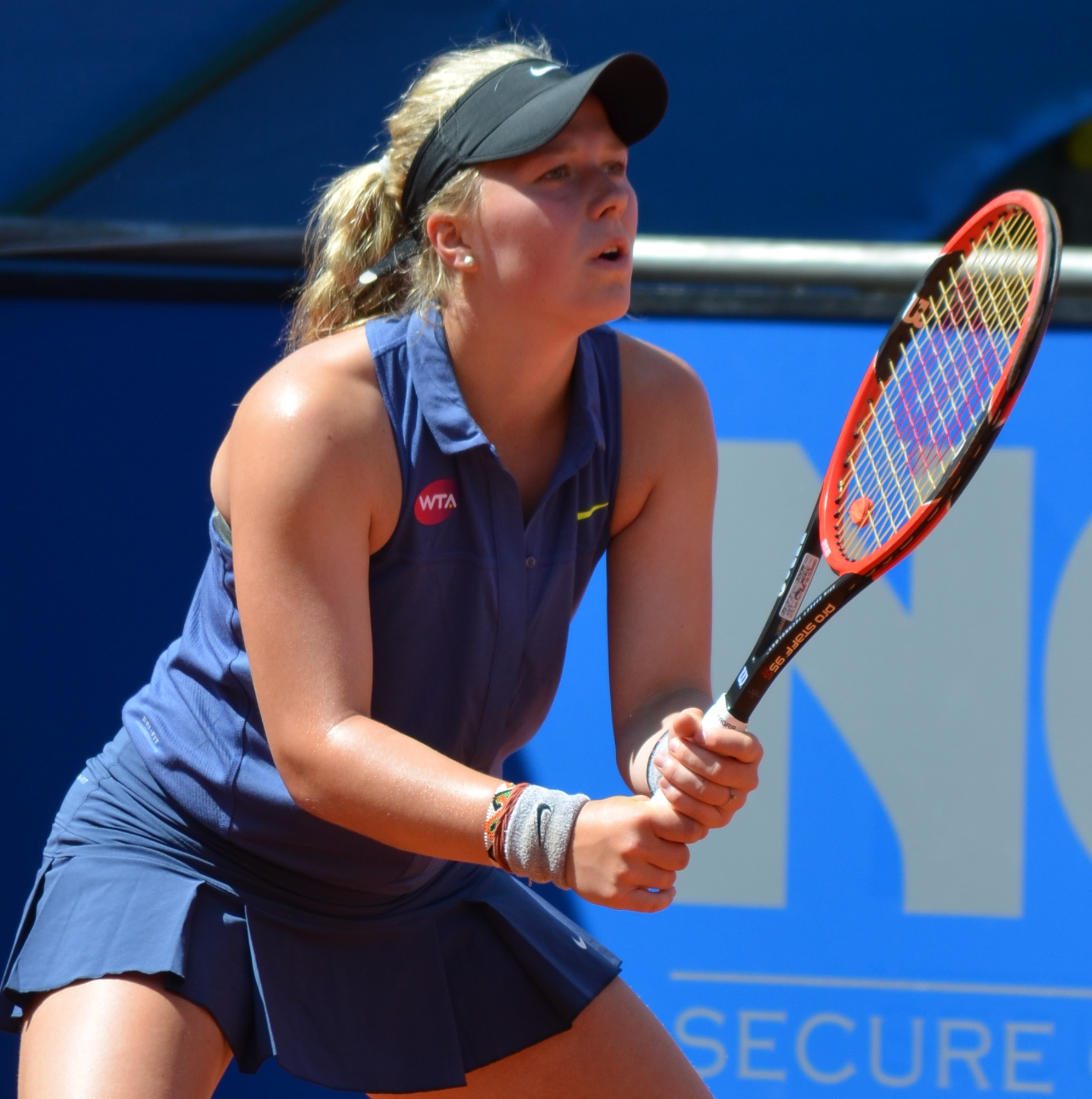 Lena Rüffer in der Qualifikationsbegegnung des Nürnberger Versicherungscup 2015 gegen Arina Rodionova am 16.05.2015